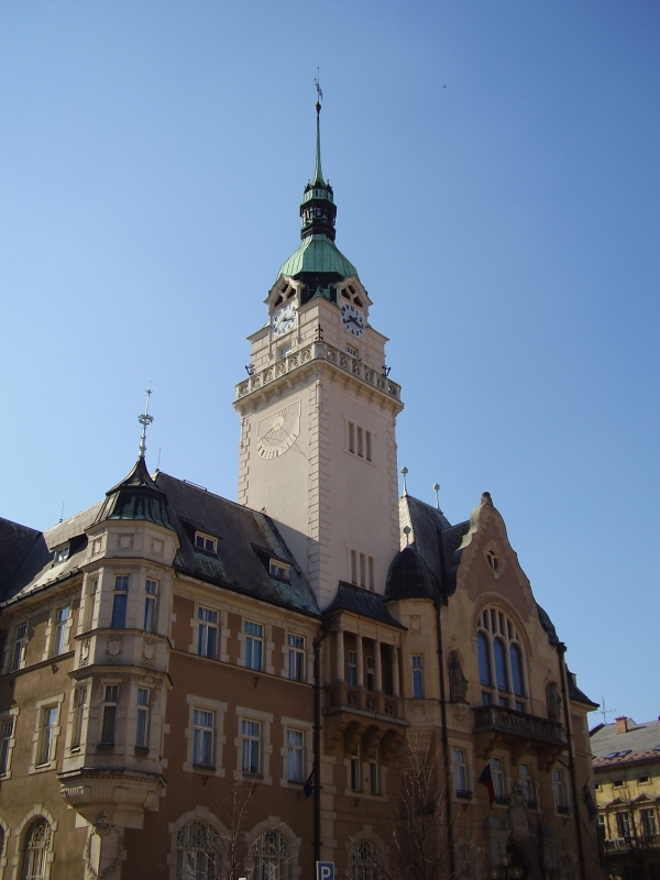 Radnice v Šumperku